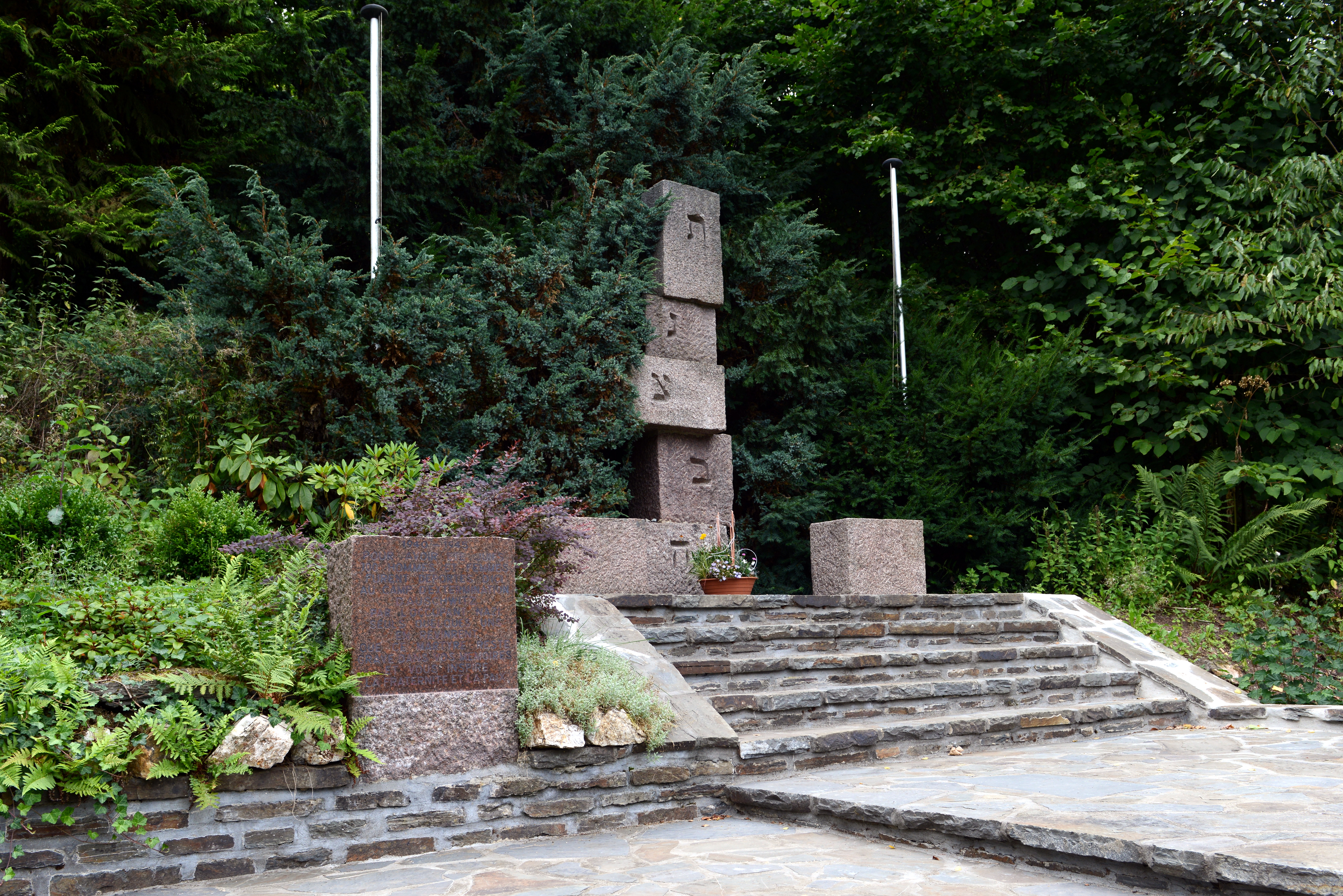 D'Auschwitz-Monument op der Pafemillen.